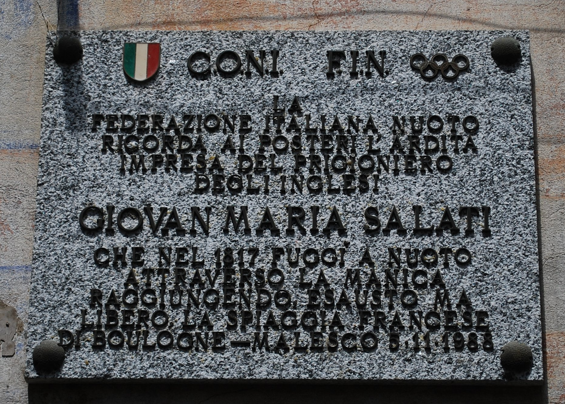 Targa affissa sull'abitazione di Giovan Maria Salati a Malesco